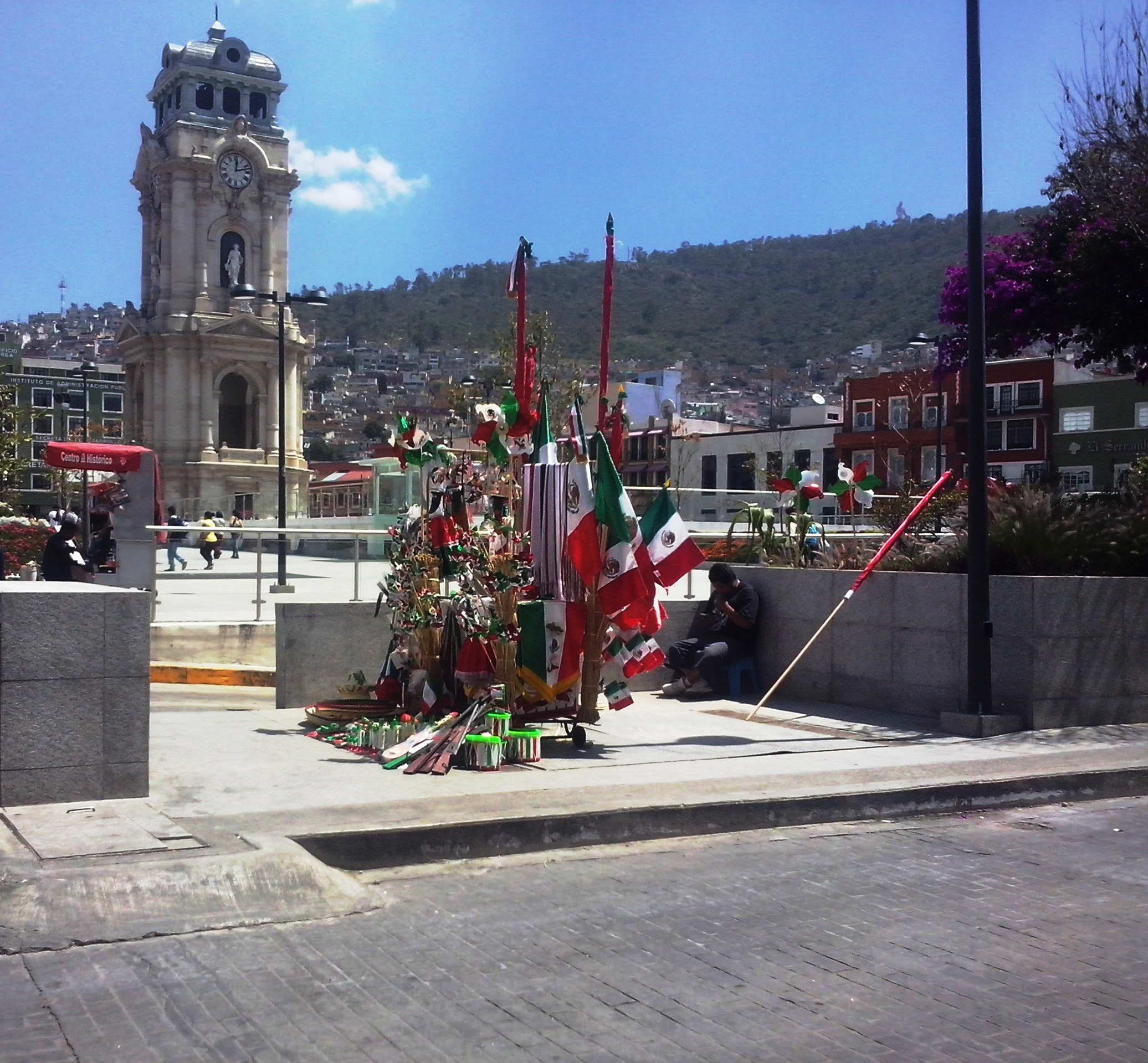 Vendedor ambulante en septiembre de artículos patrios, y banderas de México; en Pachuca, México. 01